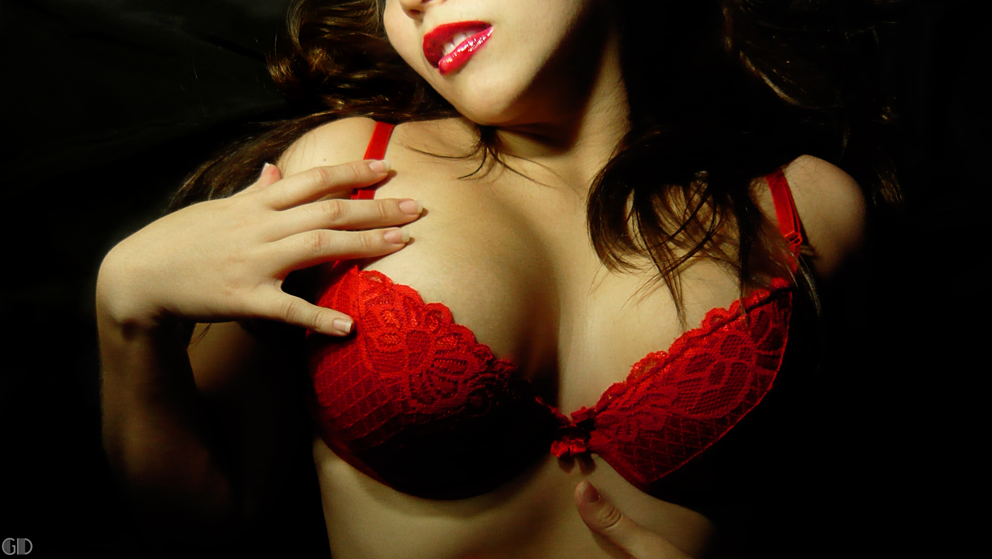 Serie: Pecados Capitales Lujuria I: Sensaciones Modelo: Edimar Rodriguez Iluminación: Ernesto Gómez Concepto y Fotografía: Gabriel Delgado